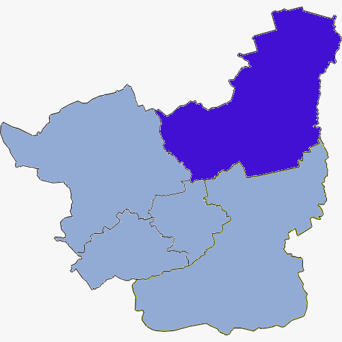 Powiat strzelecko-drezdenecki - Gmina Dobiegniew